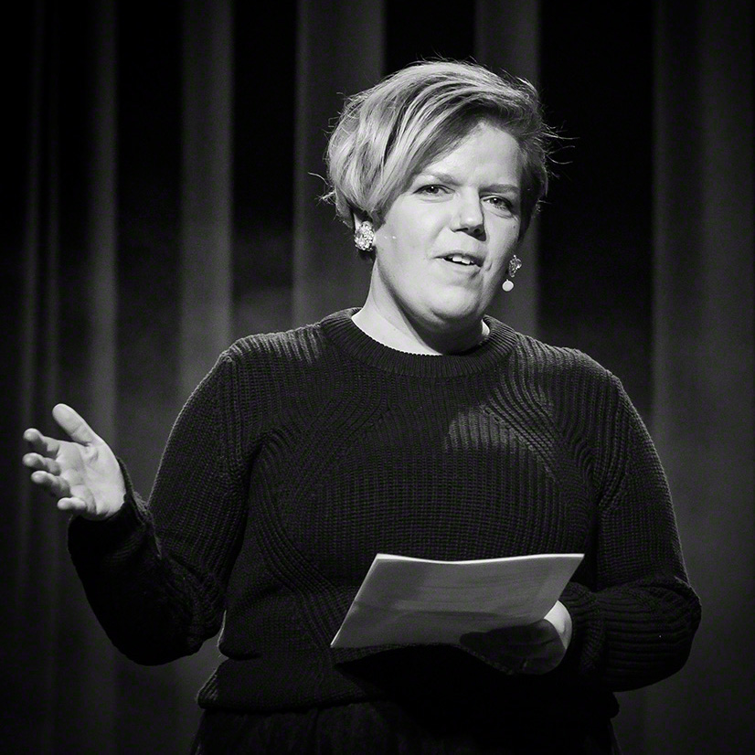 Else Kåss Furuseth på "Crap åppå Park"-festivalen på Parkteateret